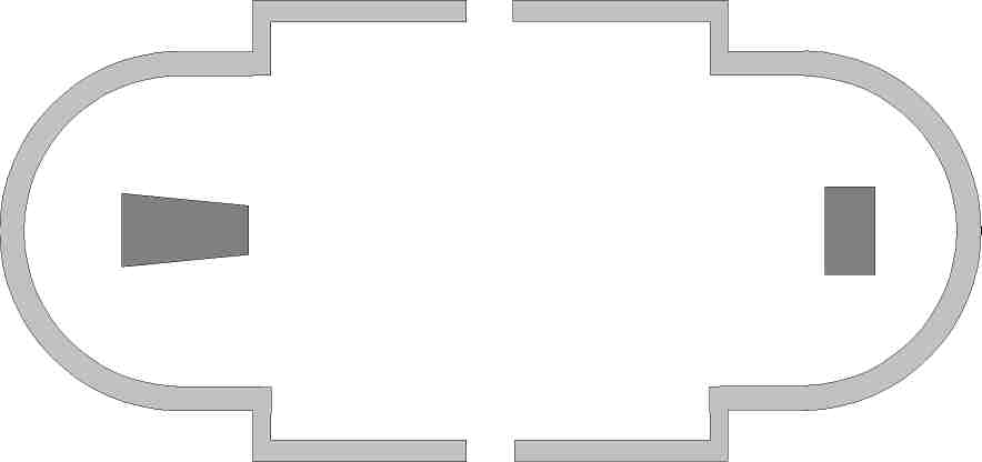 Burgheimer Kirche, erste Bauphase